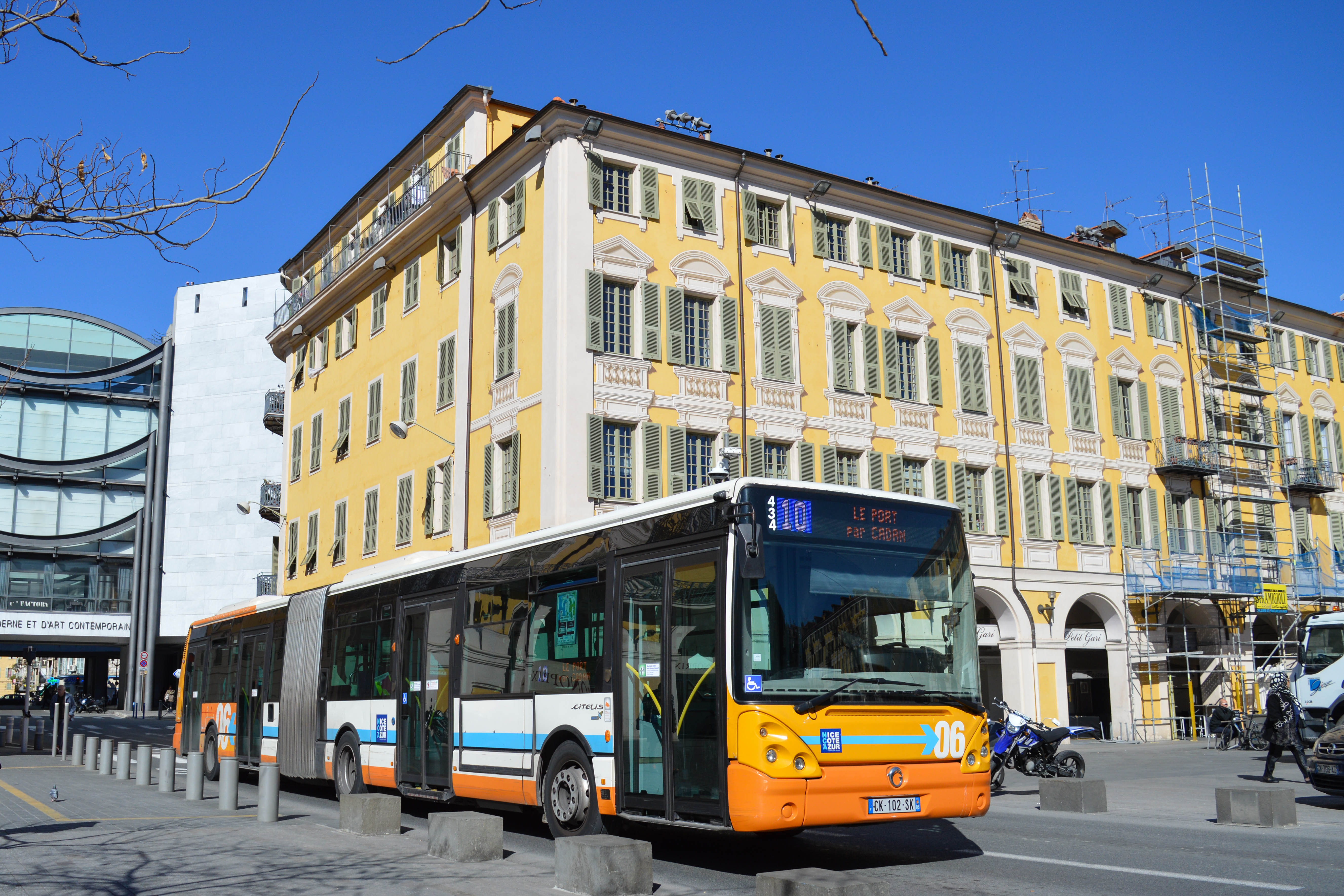 Irisbus Citelis 18 RLA